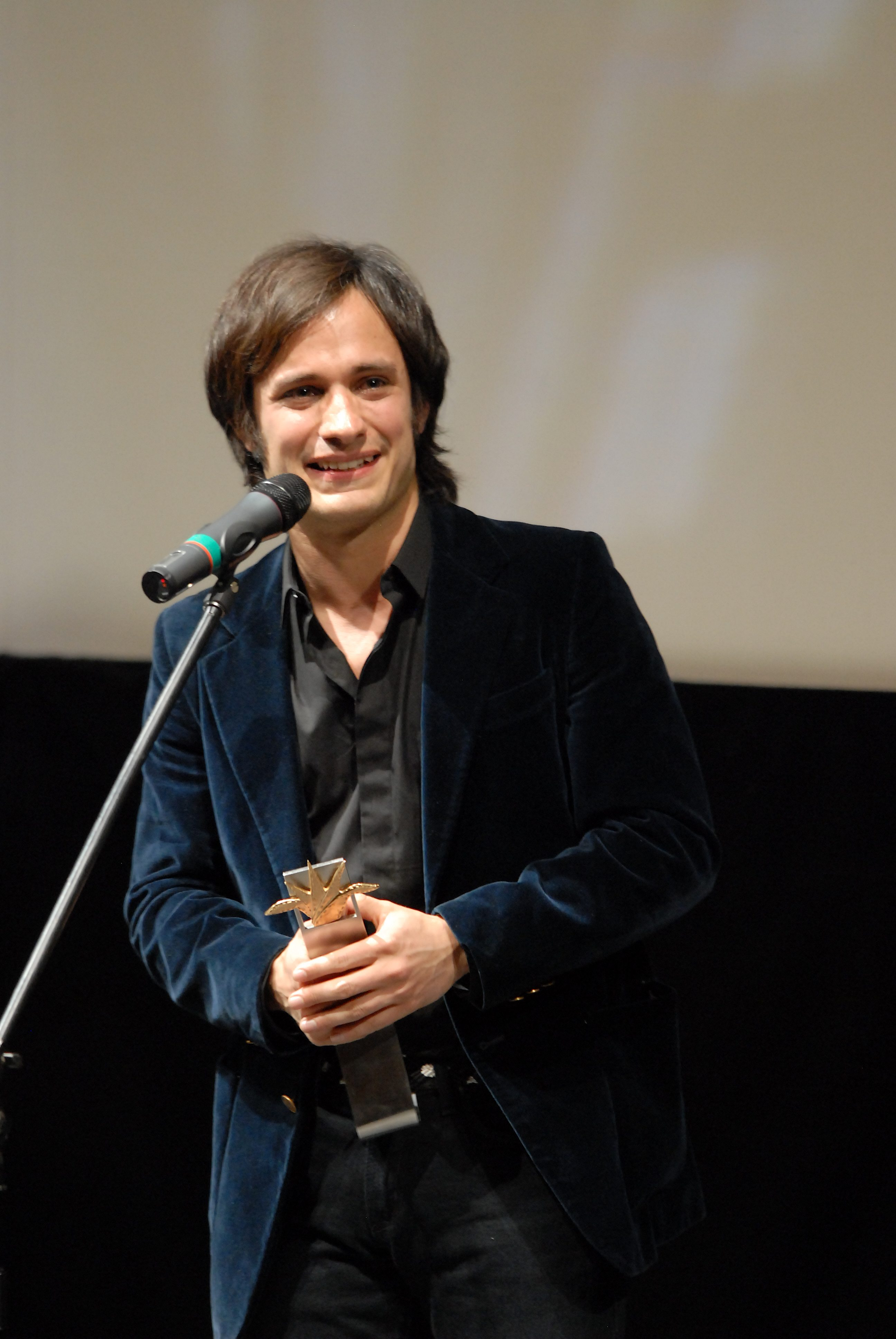 20/03/09 El actor Gael García Bernal quien recibió el Mayahuel de Plata por su trayectoria, se mostró emocionado y sorprendido por el premio, agradeció y dedicó el premio a su abuela, quien estuvo presente en la ceremonia.